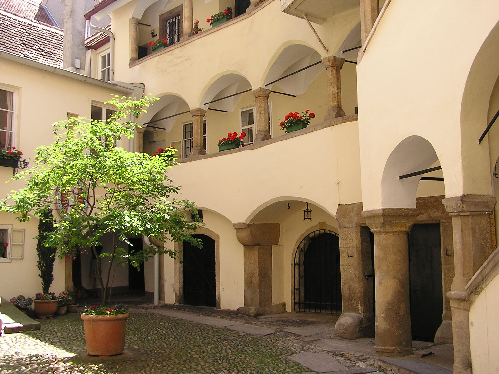 Innenhof von Sporgasse 22